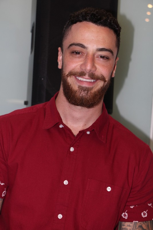 Felipe Titto na loja da TIM do Shopping Eldorado em São Paulo para o lançamento do novo Iphone 6.